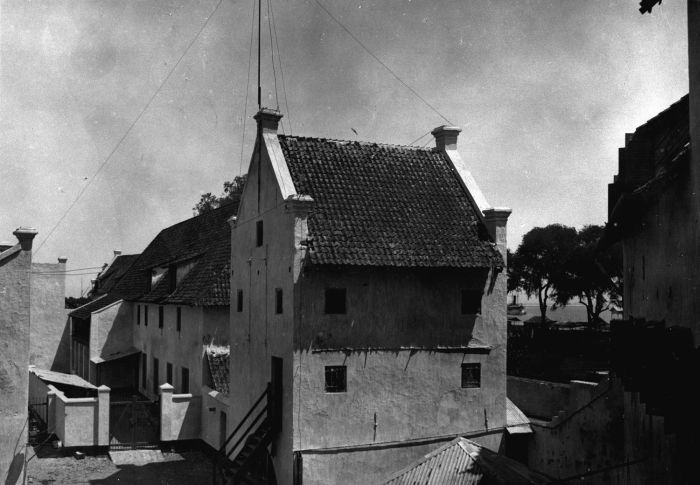 Foto. Fort Rotterdam had als kern een fort uit de tijd voor de verovering van Makassar door de VOC in 1667. Daarna hebben de veroveraars er een echte Nederlandse vesting van gemaakt, zoals de foto laat zien. Het fort, zoals de meeste forten in de Archipel strategisch aan zee gelegen, is er nog steeds. Het is niet zo lang geleden gerestaureerd en is nu een museum en cultureel centrum. In zijn Nederlandse vorm werd het fort door de inheemse bevolking wel benteng panyu genoemd, het schildpad fort, omdat het lijkt op een schildpad die uit zee kruipt. (P. Boomgaard, 2001). Binnenkant van het Fort Rotterdam te Makassar op Celebes. Binnenkant Fort Rotterdam, Makassar, Zuid-Celebes, 1923